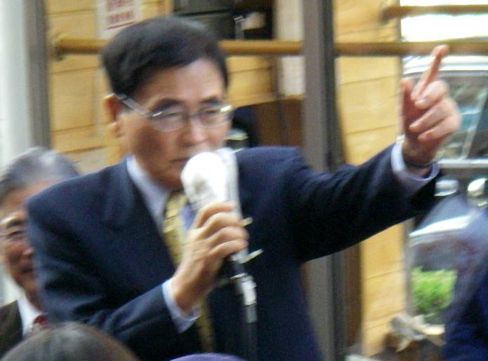 kamei,sizuka (Japanese politician)